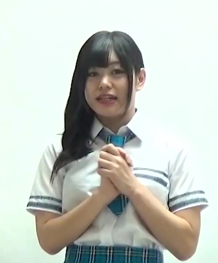 加藤江莉 - Sanspo Idol Reporter